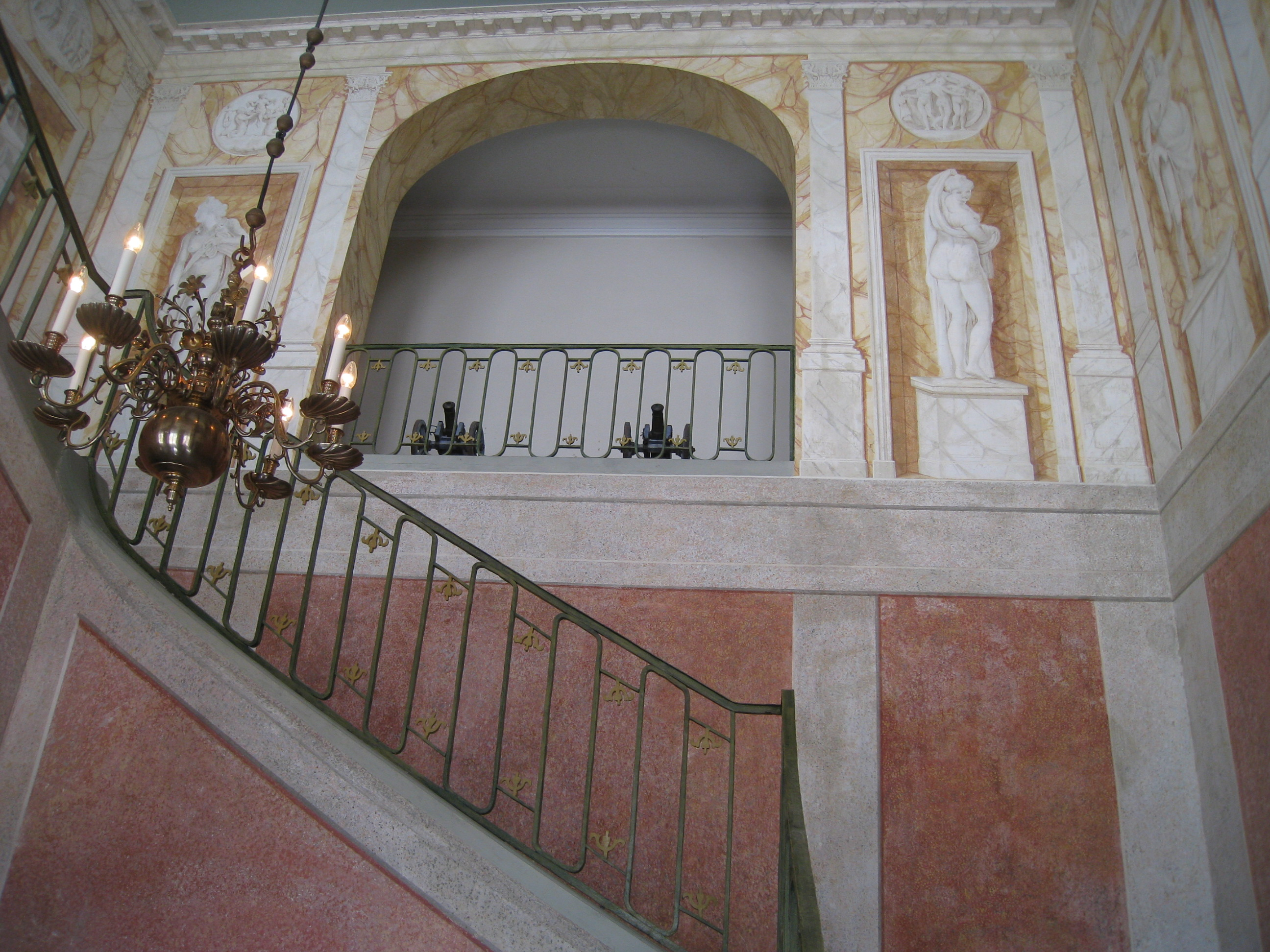 Tullgarns slott, interiör, trapphuset, Hölö, Södertälje kommun, Södermanland. Trapphuset mellan första och andra våningen dekorerades på 1790-talet med målningar av Anders Hultgren (1763-1868).